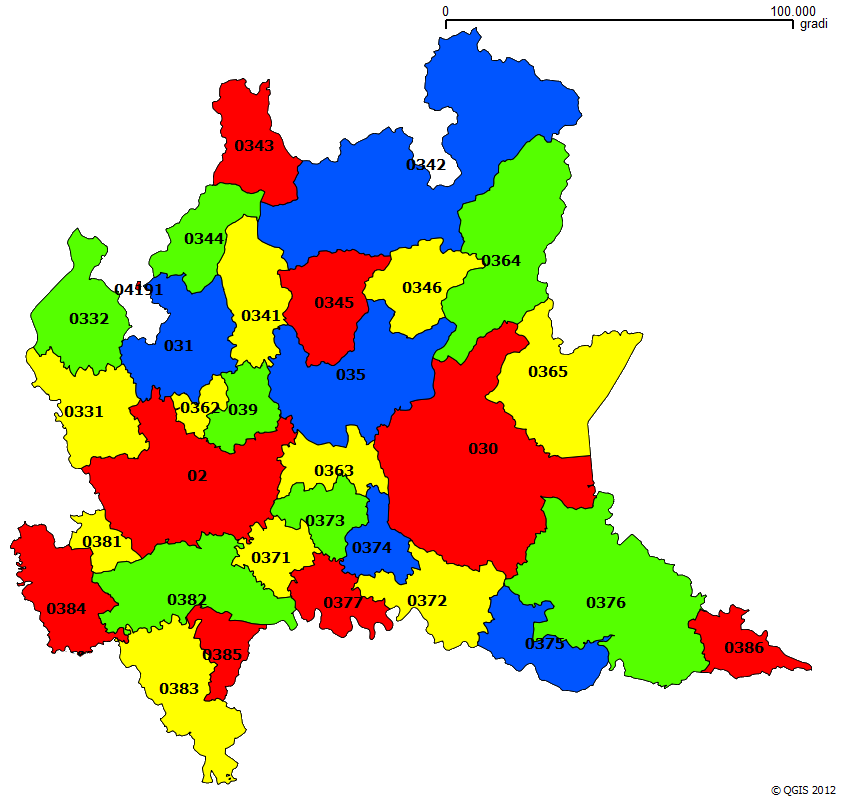 La mappa é stata creata con Quantum GIS, che ha estrapolato i dati da un database geospaziale pubblico.